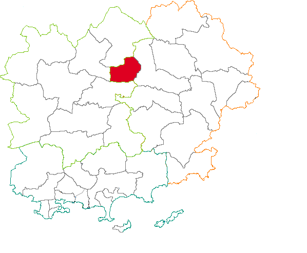 Situation du canton dans la département du Var (83), France